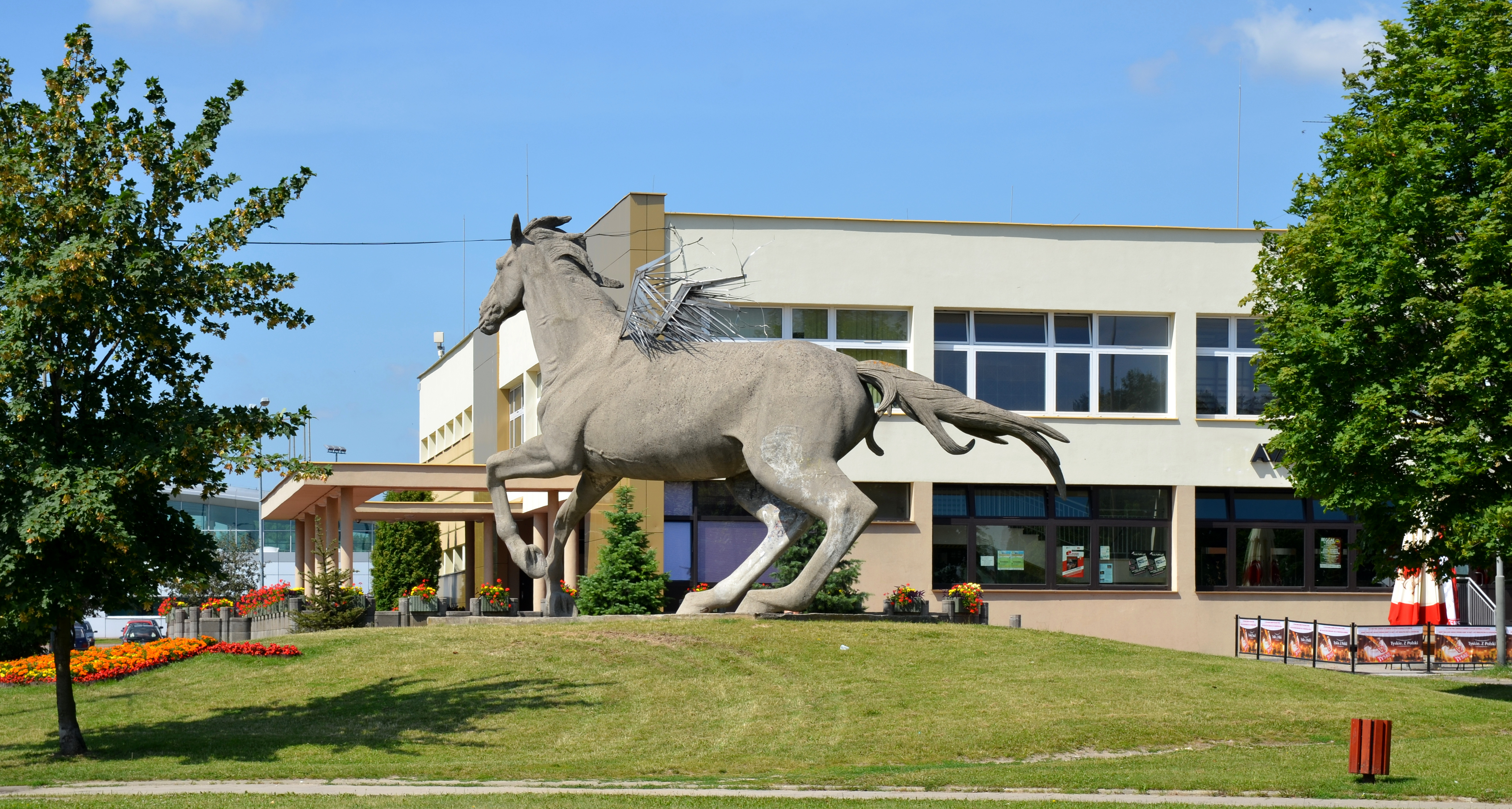 Miejski Dom Kultury w Opocznie.